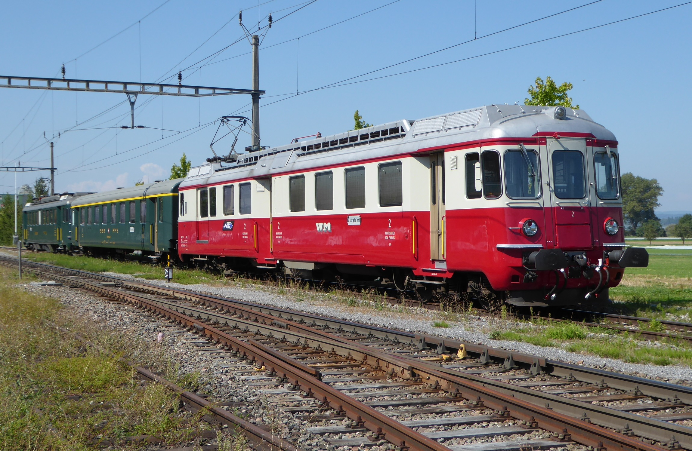 Doppelpendelzug des Vereins Depot und Schienenfahrzeuge Koblenz (DSF), bestehend aus dem BDe 4/4 2 der ehemaligen Wohlen-Meisterschwanden-Bahn (WM), einem Erstklass-Einheitswagen I und dem RBe 4/4 1405, in Tägerwilen-Gottlieben.